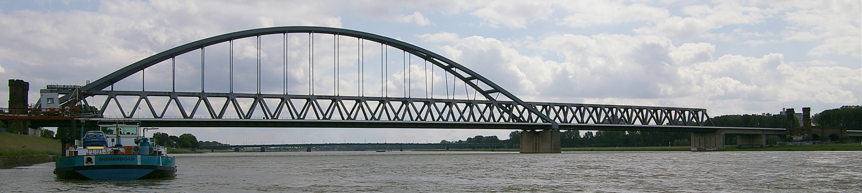 Hammer Eisenbahnbrücke in Düsseldorf über den Rhein, Blickrichtung stromaufwärts